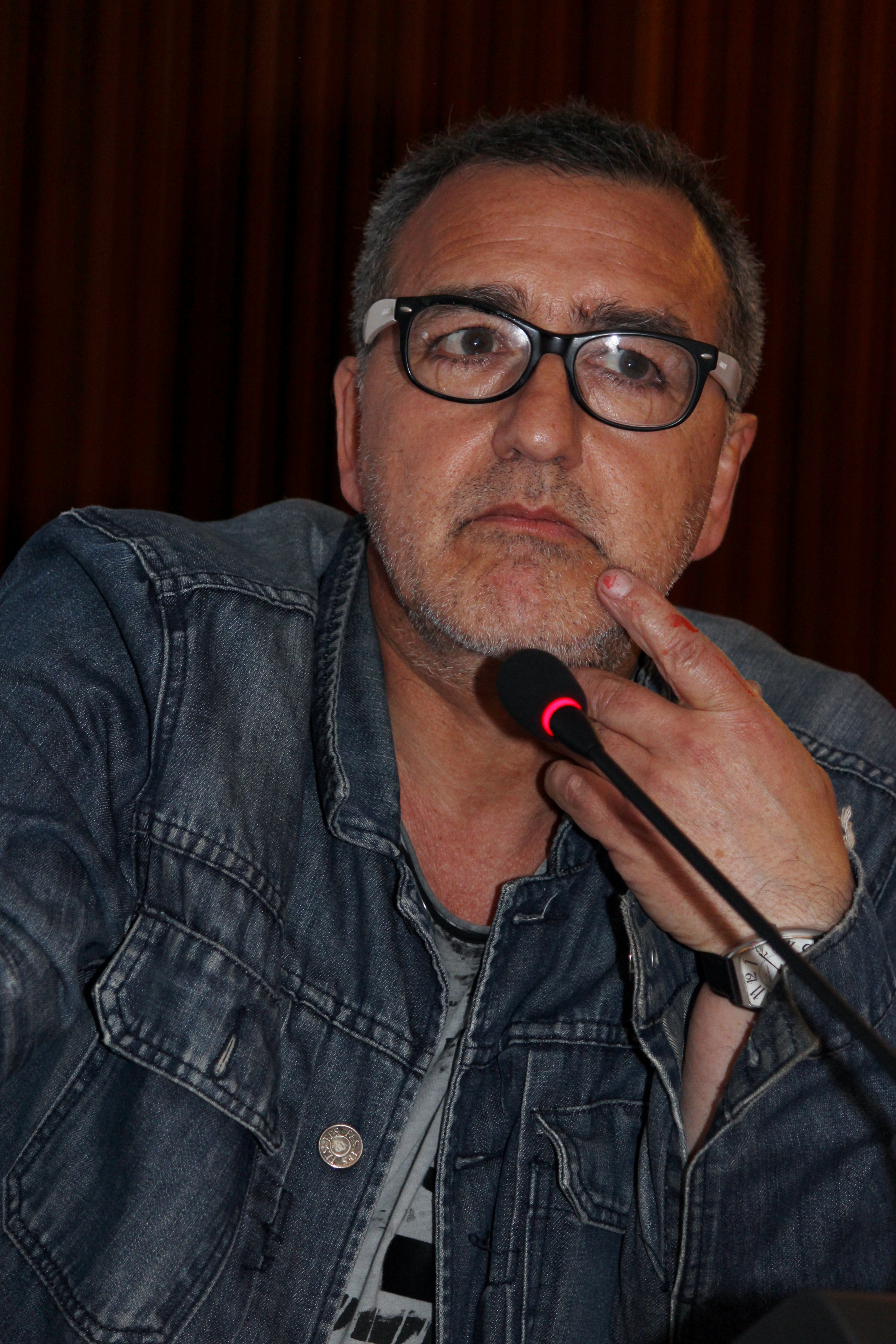 El escritor Marcelo Mellado en la mesa de conversación «El cuento contemporáneo en Chile» celebrada la segunda etapa del Festival de Autores de Santiago 2018; GAM, 9 de noviembre.